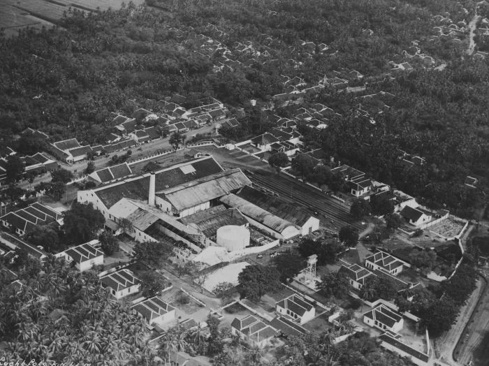 Foto. Luchtfoto van suikerfabriek Pagongan in Tegal